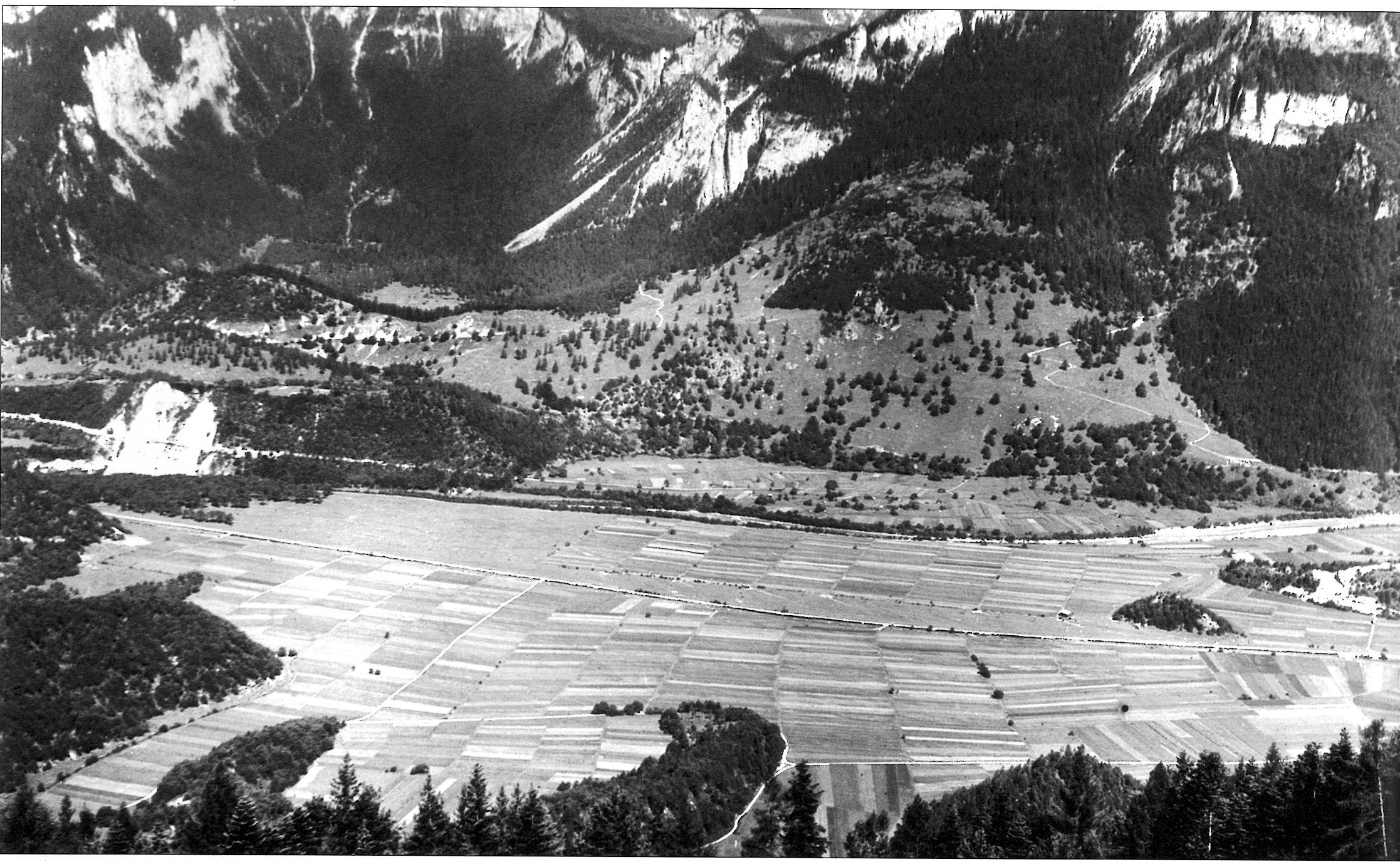 Ebene westlich Domat/Ems Links stehen heute die Anlagen der Ems-Chemie.